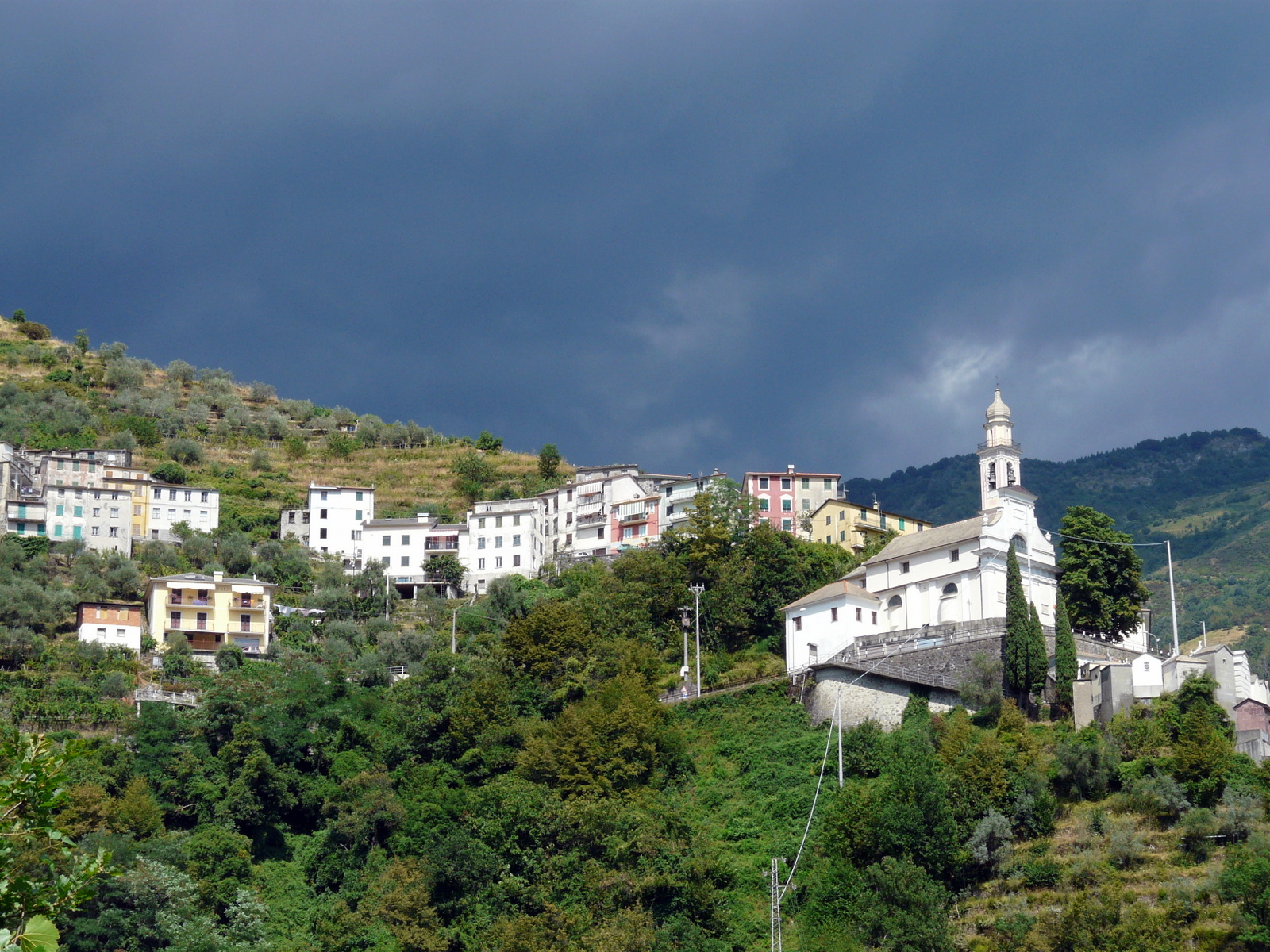 Lorsica, Liguria, Italia